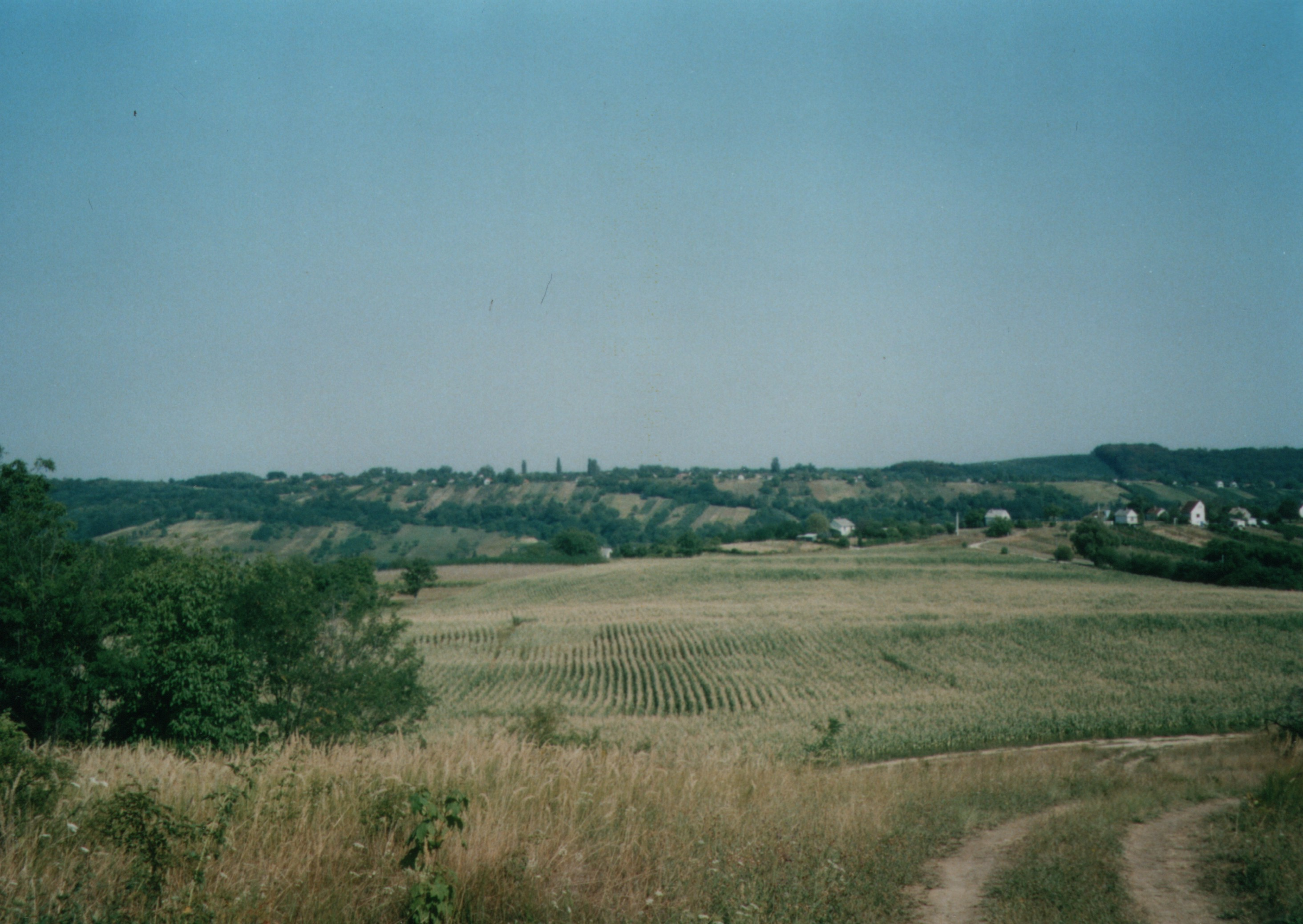 Nagybakónak